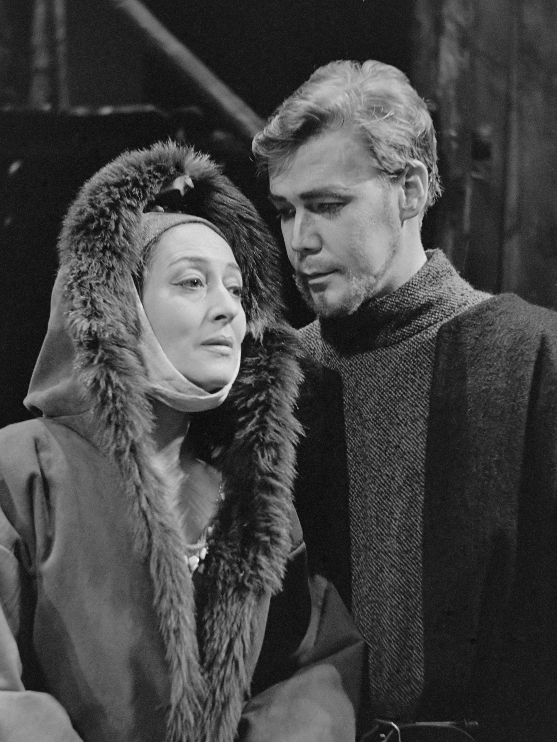 Gijsbrecht van Aemstel in nieuwe stijl, Gijsbrecht van Aemstel ( Hans Boswinkel ) en Badeloch ( Lous Hensen ) 1 januari 1966